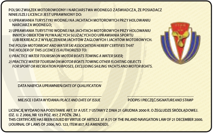 Wzór licencji do holowania narciarza wodnego z 2013 roku. Rewers.